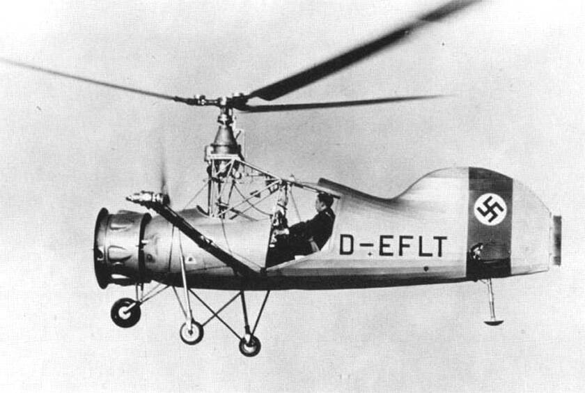 Esta aeronave de tipo convertible, además de su rotor de elevación de tres palas, tenía dos hélices de paso variable montadas en ambos lados en estabilizadores laterales, con empuje en direcciones opuestas para contrarrestar el par del rotor. El motor, situado en la nariz, se enfrió con un ventilador ajustable de tres palas que consumía aproximadamente 14 hp, y en vuelo horizontal, la potencia restante se usó para impulsar las hélices exteriores, mientras que el rotor de elevación giró por auto rotación. La caja de cambios principal estaba en la parte delantera de la cabina. Al Fl.185 , que tenía un tren de rodaje de tres ruedas, se le dieron solo unas pocas pruebas cerca del suelo, y luego se abandonó a favor del Fl.265 , que incorporaba el sistema de rotor engranado en el que Flettner había comenzado a trabajar.